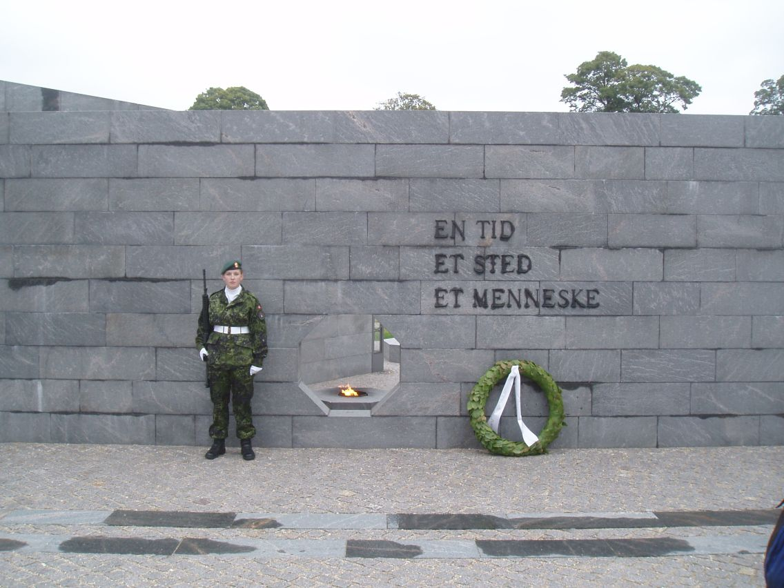 Mindesmærket for Danmarks deltagelse i internationale militære operationer.